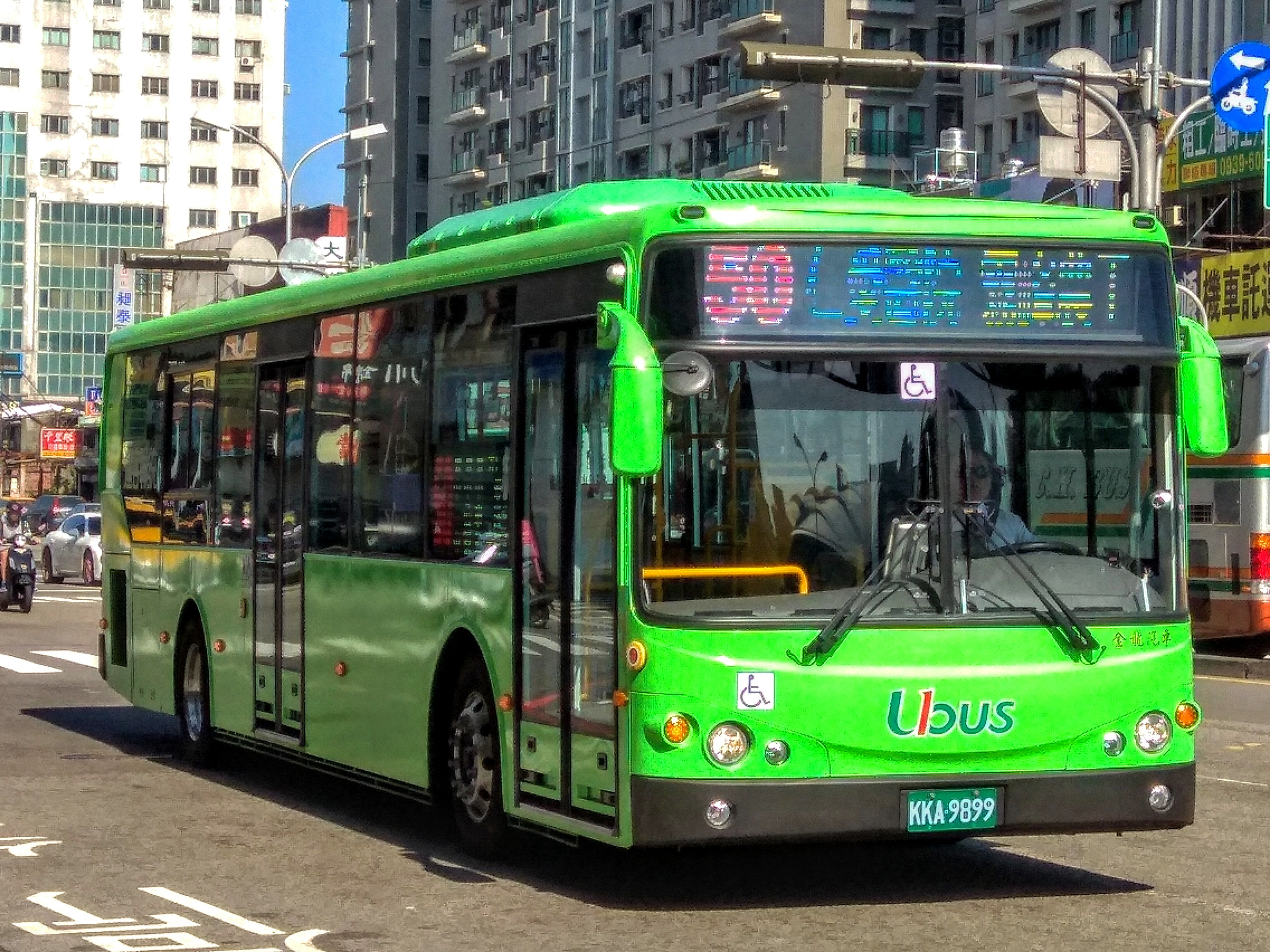 統聯客運中興金龍KL6120U1大客車 KKA-9899